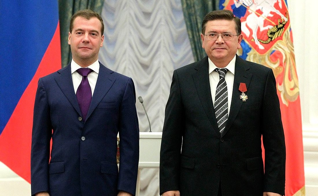 Церемония вручения государственных наград. Орденом «За заслуги перед Отечеством» IV степени награждён Петр Шаболтай – художественный руководитель Государственного Кремлевского Дворца